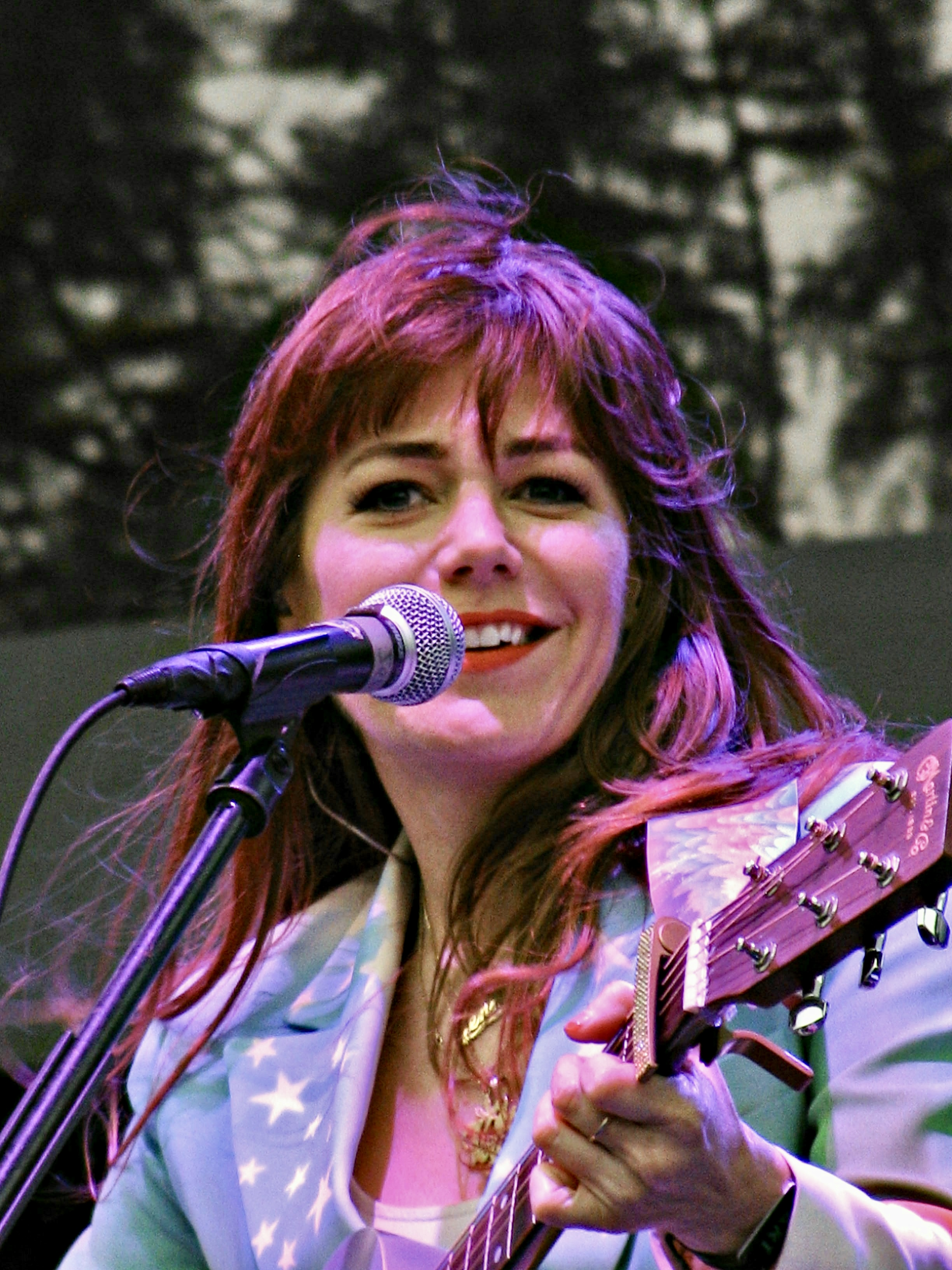 Jenny Lewis en el Festival Corona Capital 14 en México DF